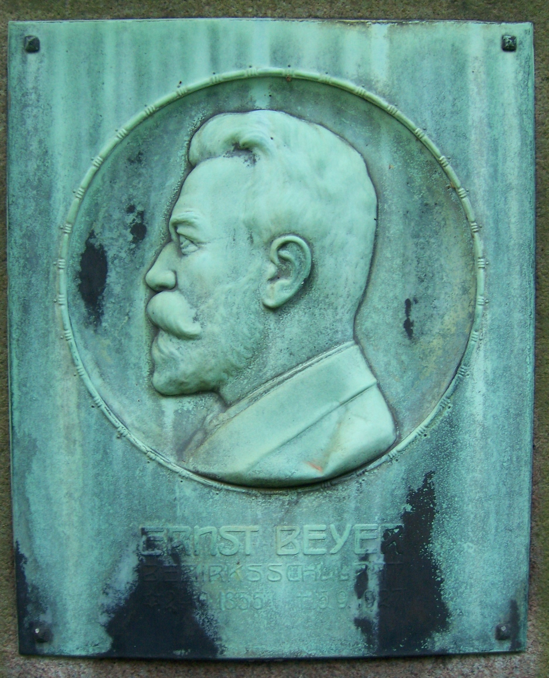 Porträtmedaillon Ernst Beyer